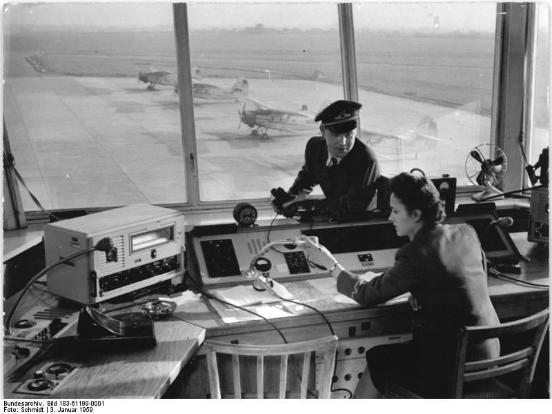 Leipzig, Flughafen, Tower, Flugzeuge Zentralbild Schmidt Hein-Noa A.V.2725 3.1.1959. Telefoto 5.1.1959. Große Begeisterung über den Start der Mondrakete auf dem Flughafen in Leipzig-Mockau. Seit Bekanntwerden des Startes der sowjetischen Mondrakete stehen die Angestellten des Flughafens Leipzig-Mockau an den Radios und an den Funkgeräten, um die Sendezeichen zu hören. "Den besten Beweis haben die sowjetischen Wissenschaftler durch diese gewaltige Friedenstat der Weltraumerforschung gezeigt, mit der sie eindeutig in der Welt an der Spitze stehen," sagten der Kommandodispatcher Fiedler und die Dispatcharin Karin Stöhr auf dem Kommandoturm das Flughafens Leipzig-Mockau.